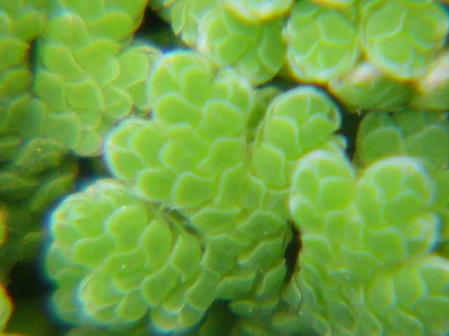 Species: Azolla filiculoides Family: Azollaceae Image No. 1